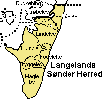 Langelands Sønder Herred Svendborg Amt, Denmark.